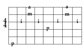 En illustration över ett grundläggande plockkomp.